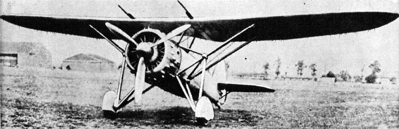 Francuski samolot myśliwski Dewoitine D.371.